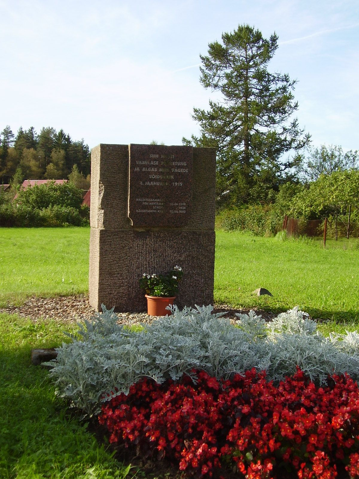 Pilt Lahinguvälja mälestusmärgist